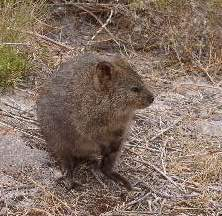 Seitenansicht eines Quokka auf Rottnest Island (West Australien)